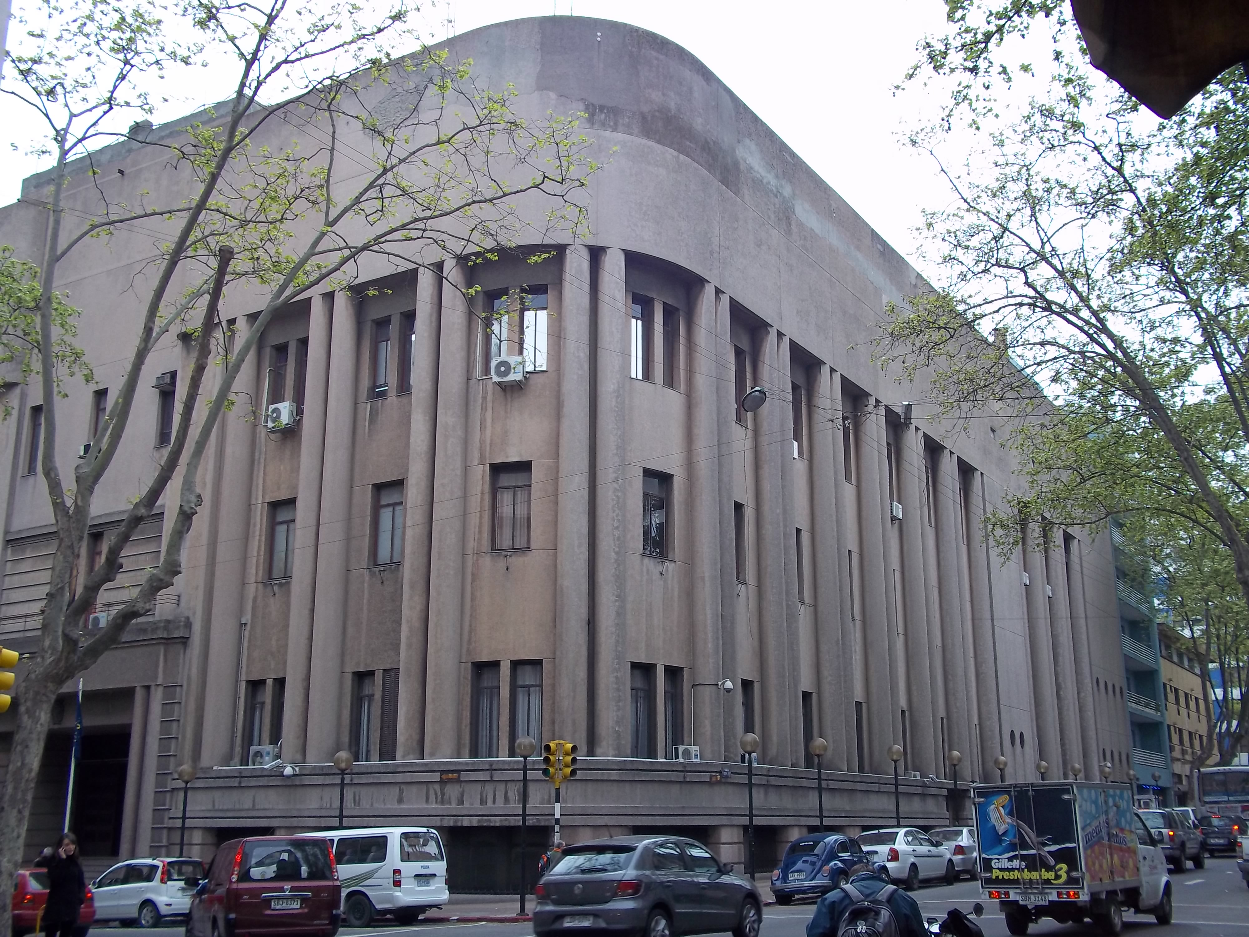 Edificio de la Jefatura de Policía de Montevideo. También alberga la Cárcel Central.